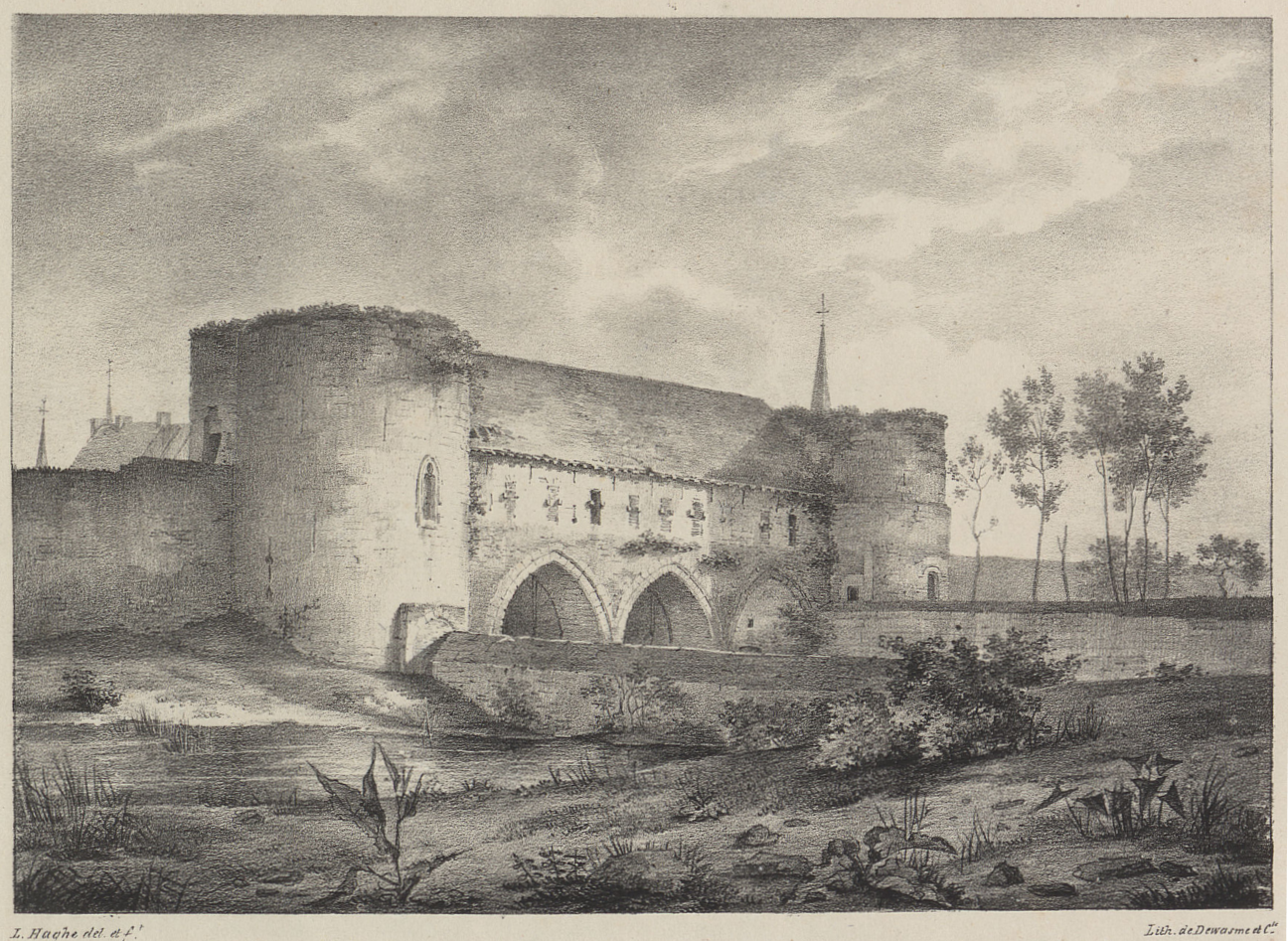 Pont des Trous, Doornik